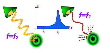 Espektroskopia infragorriaren fundamentua